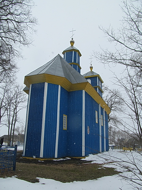 Пишите здесь